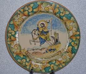 CERAMICA DI CALTAGIRONE, PIATTO DI SAN GIACOMO, PATRONO DELLA CITTà, DECORATO CON ORNATO E FONDO VERDE RAMINA.